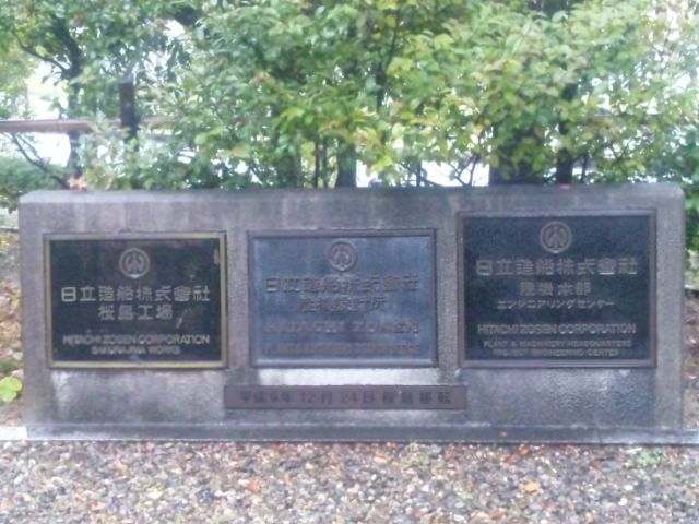 桜島神社入って右手にある記念碑。投稿者本人の撮影。